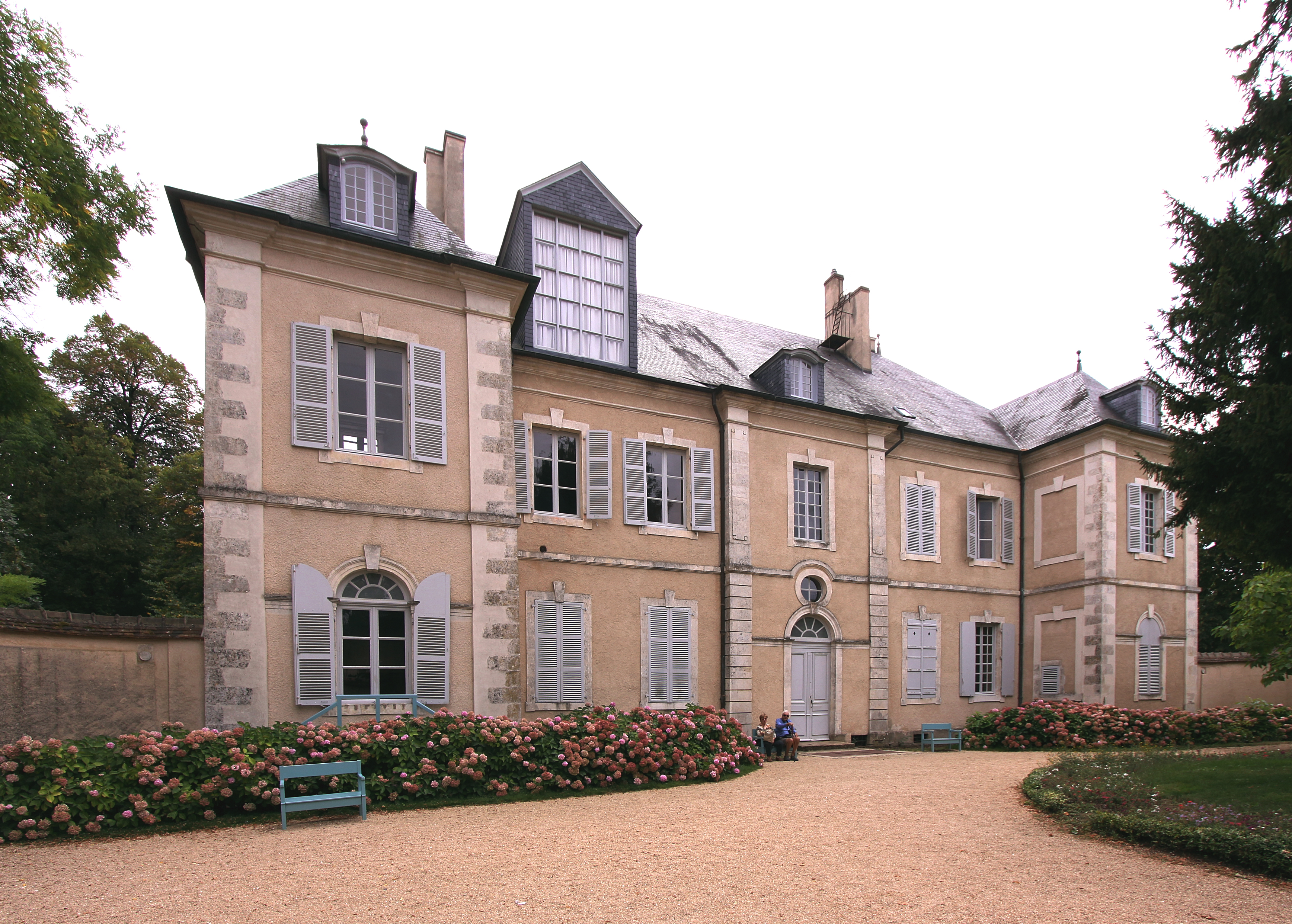 Nohant-Vic im französischen Département Indre - Maison de George Sand